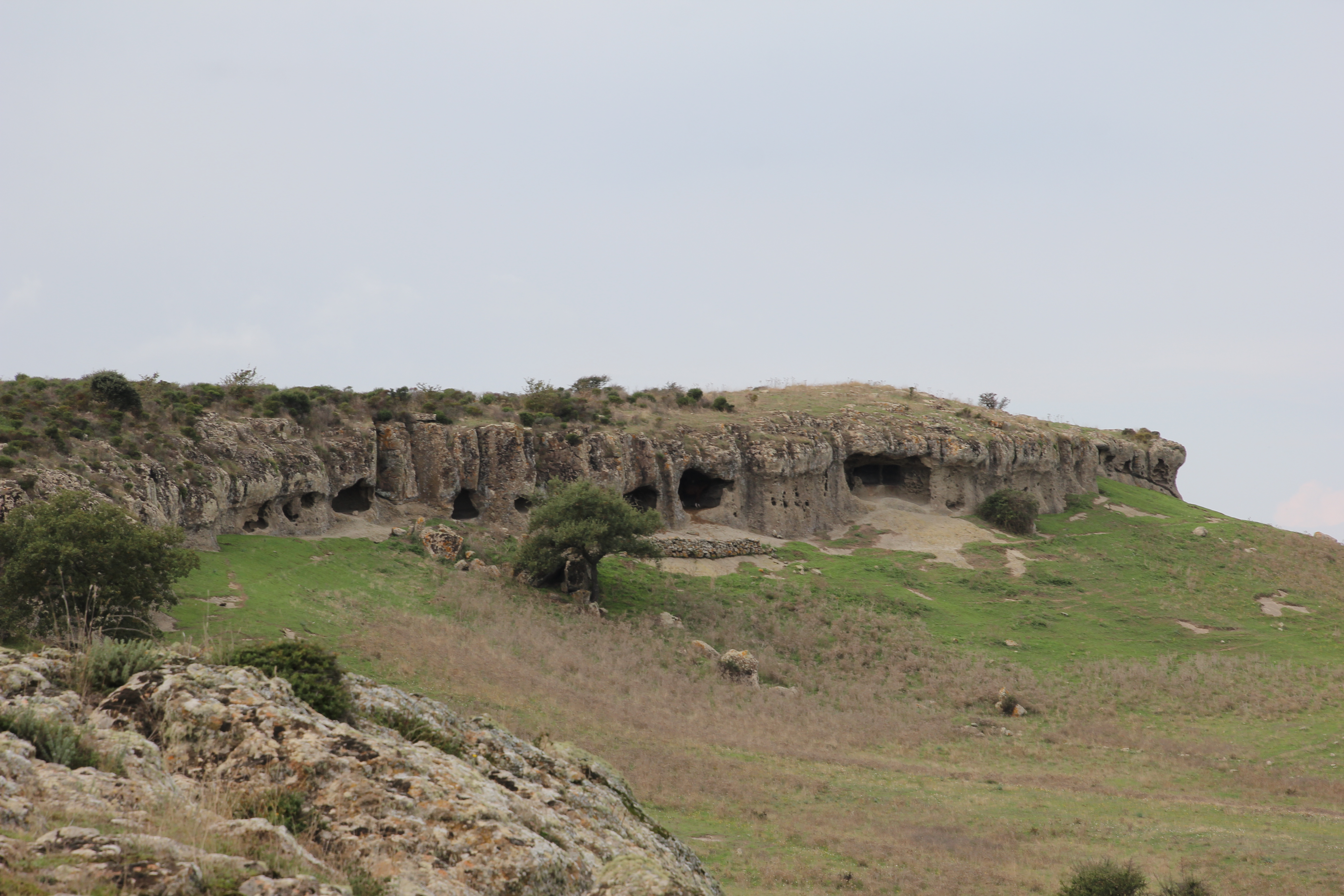 Bessude, necropoli di Enas de Cannuja